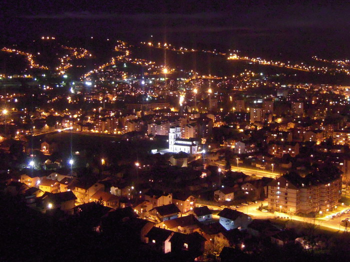 Obilićevo (Mejdan) noću, u sredini crkva Sv. Vaslijia Ostroškog